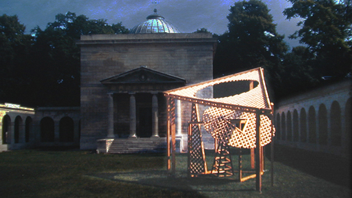 Sculpture en treillage de bois et végétation